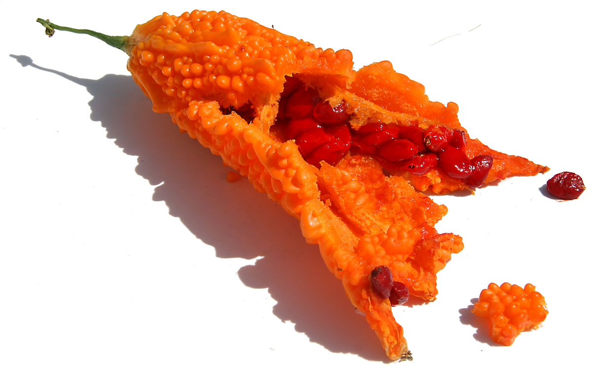 Margose mûre ouverte